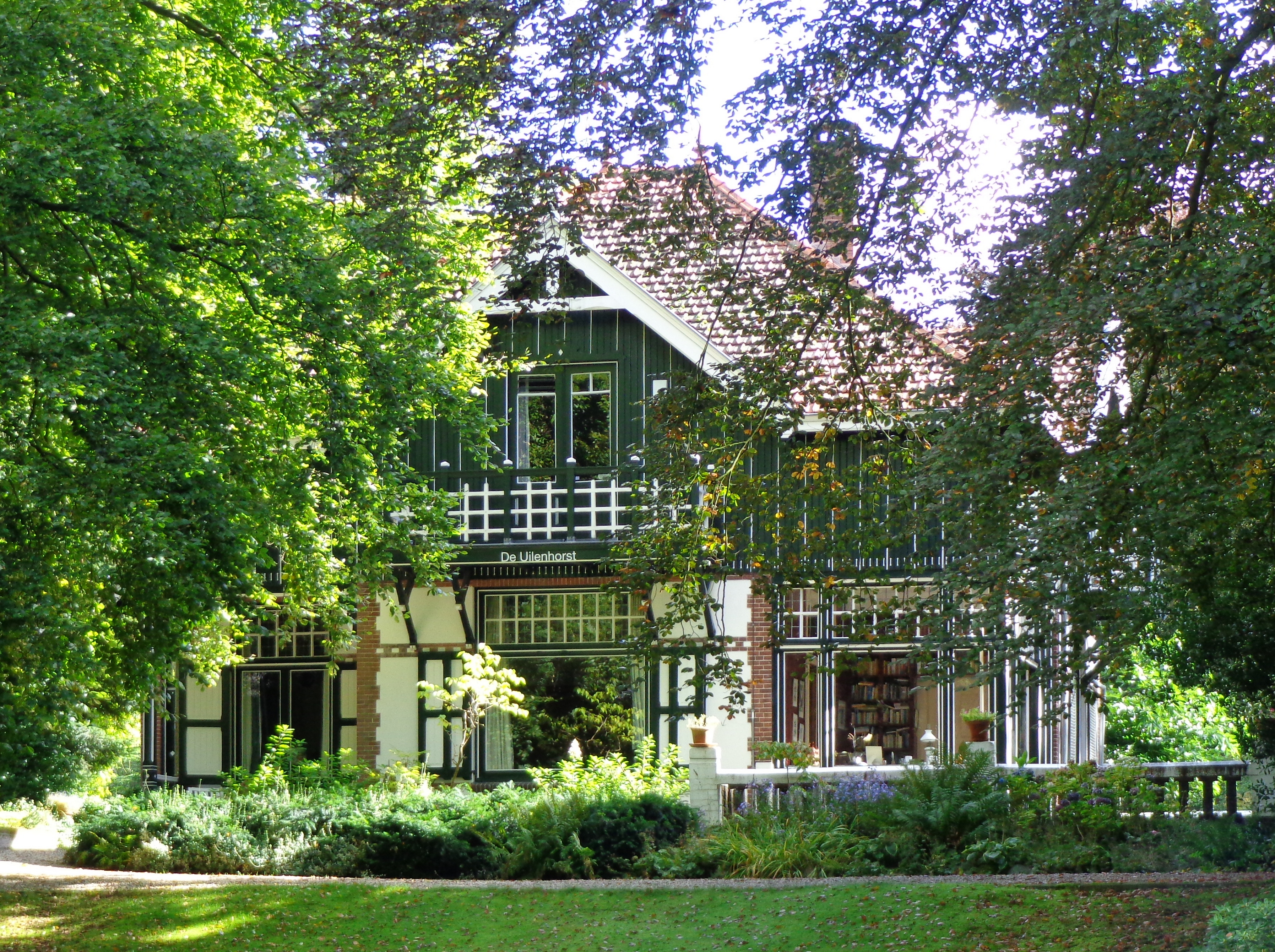 De Uilenhorst